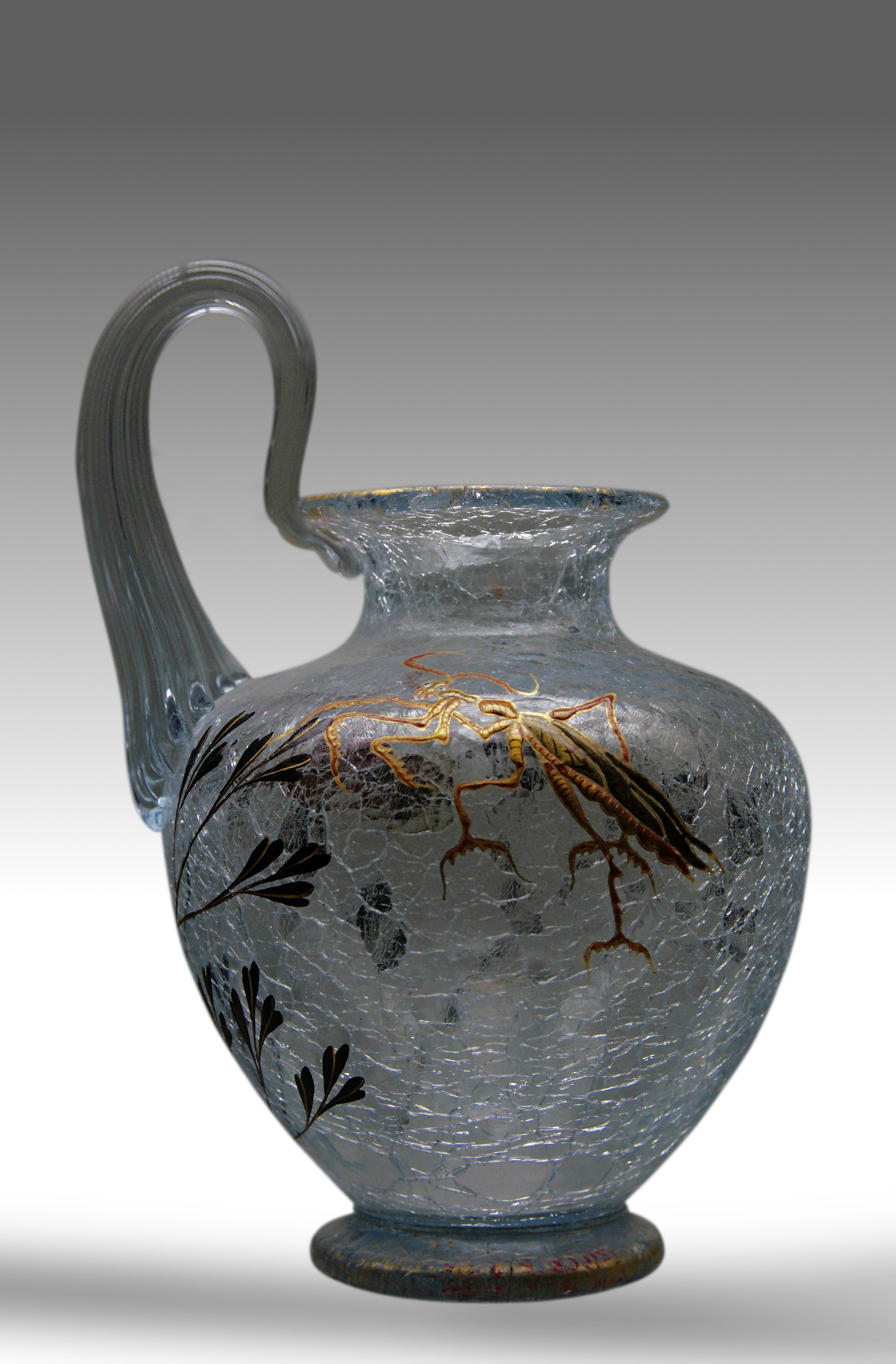 Petit vase craquelé, Émile Gallé, vers 1880. Décor de mante religieuse d'un côté, de cigale de l'autre. Collection musée de l'École de Nancy